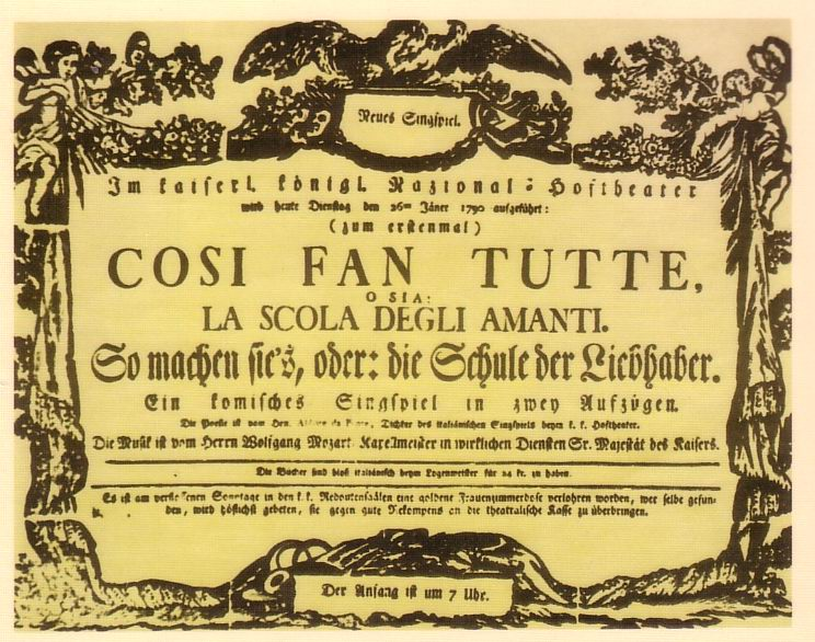 Theaterzettel der Uraufführung von Così fan tutte am Burgtheater Wien, 26. Januar 1790